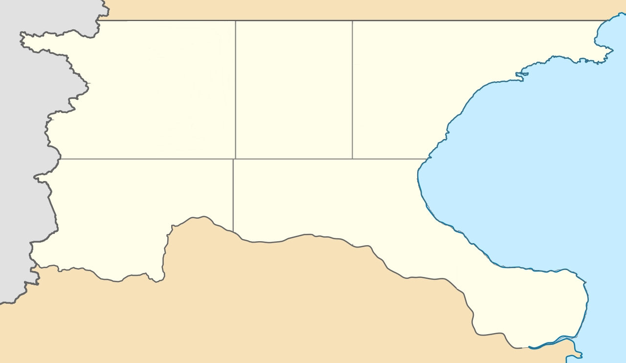 Cuenca del Golfo San Jorge